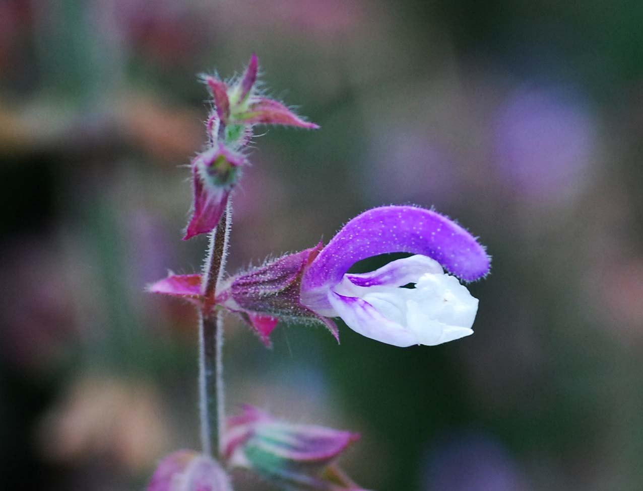 Salvia sclarea, fleur, jardin des Plantes de Paris